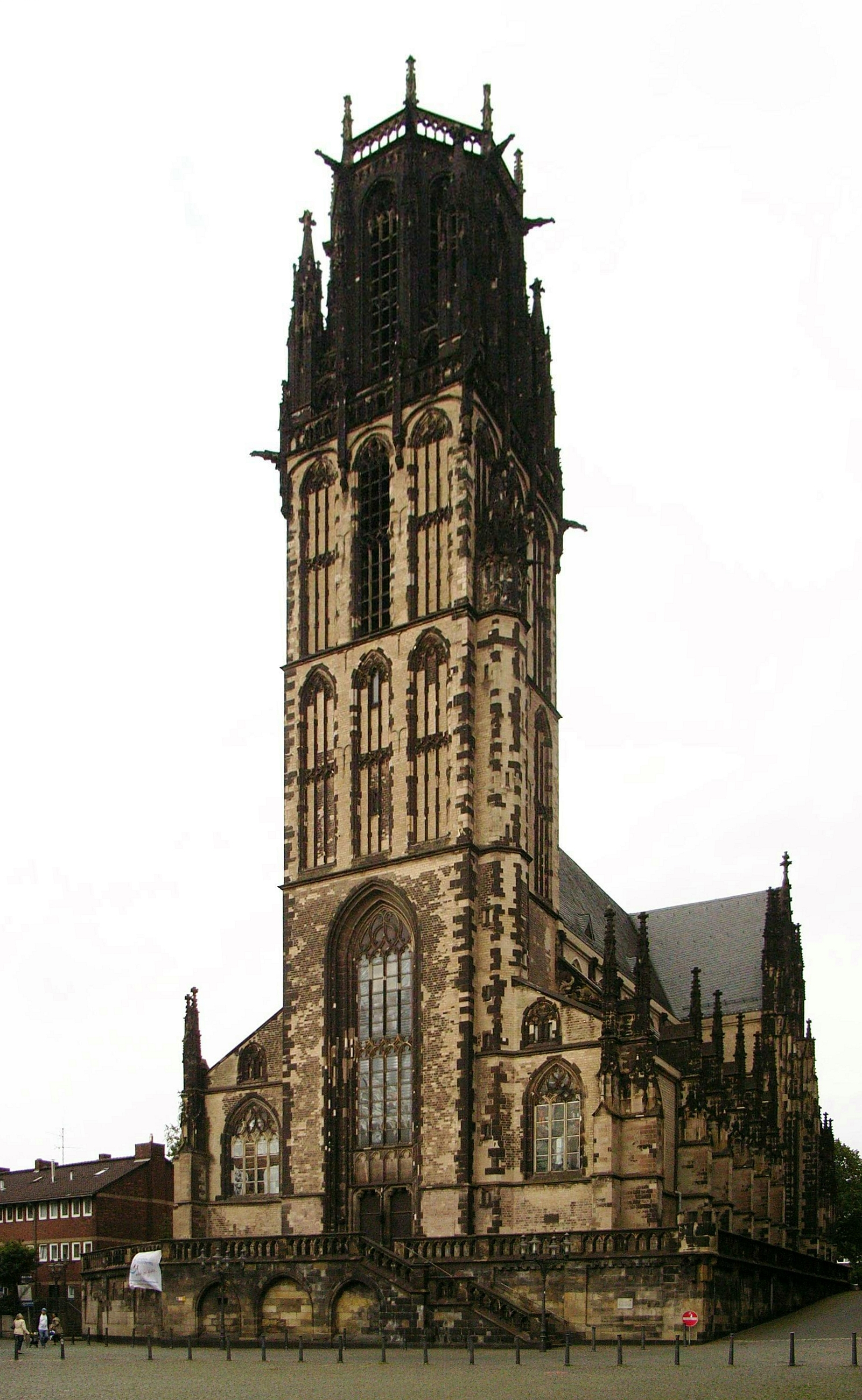 Dieses Bild zeigt die Salvatorkirche in Duisburg.